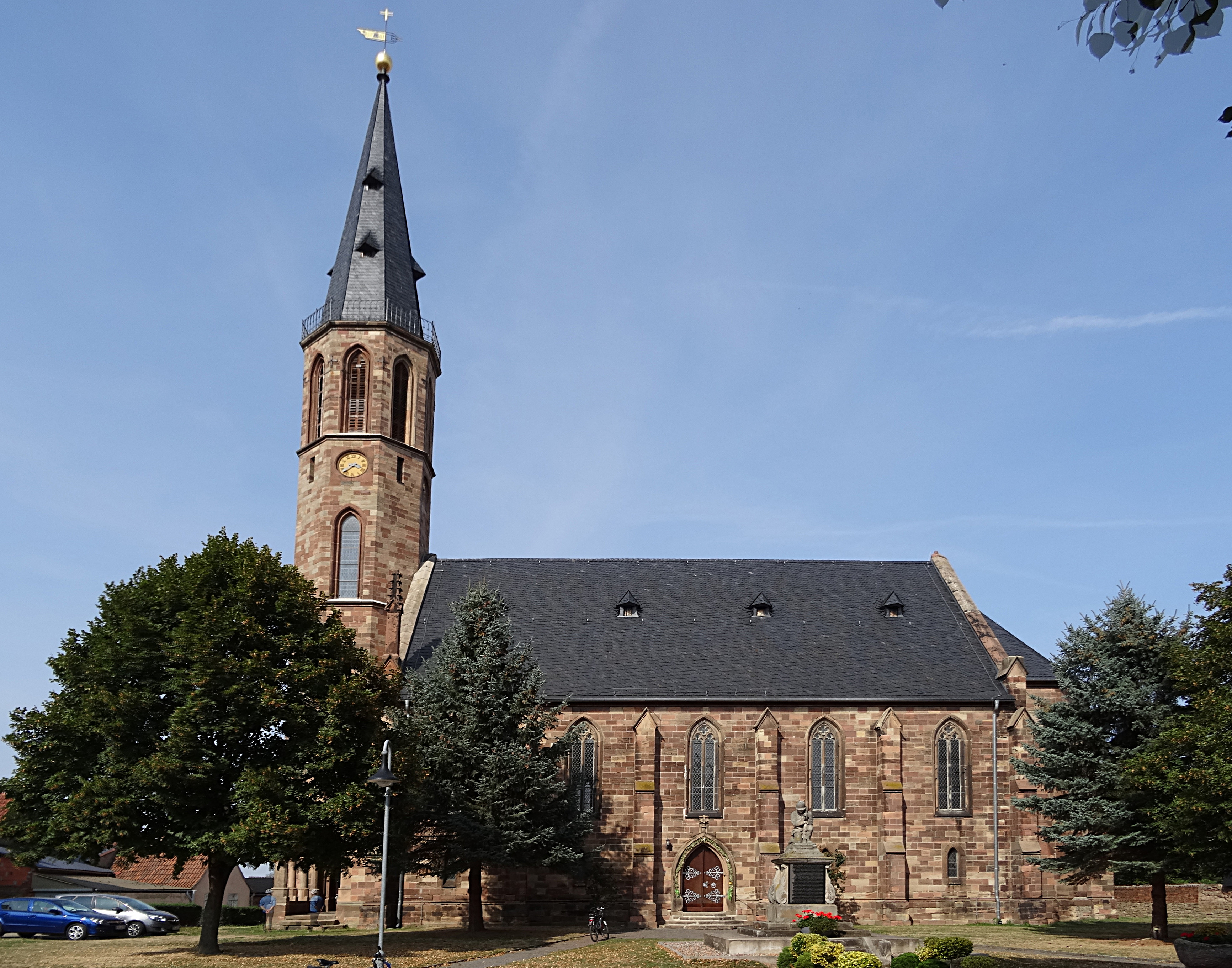 Dorfkirche St. Johann Baptist (Gehofen) aus Nebraer Sandstein